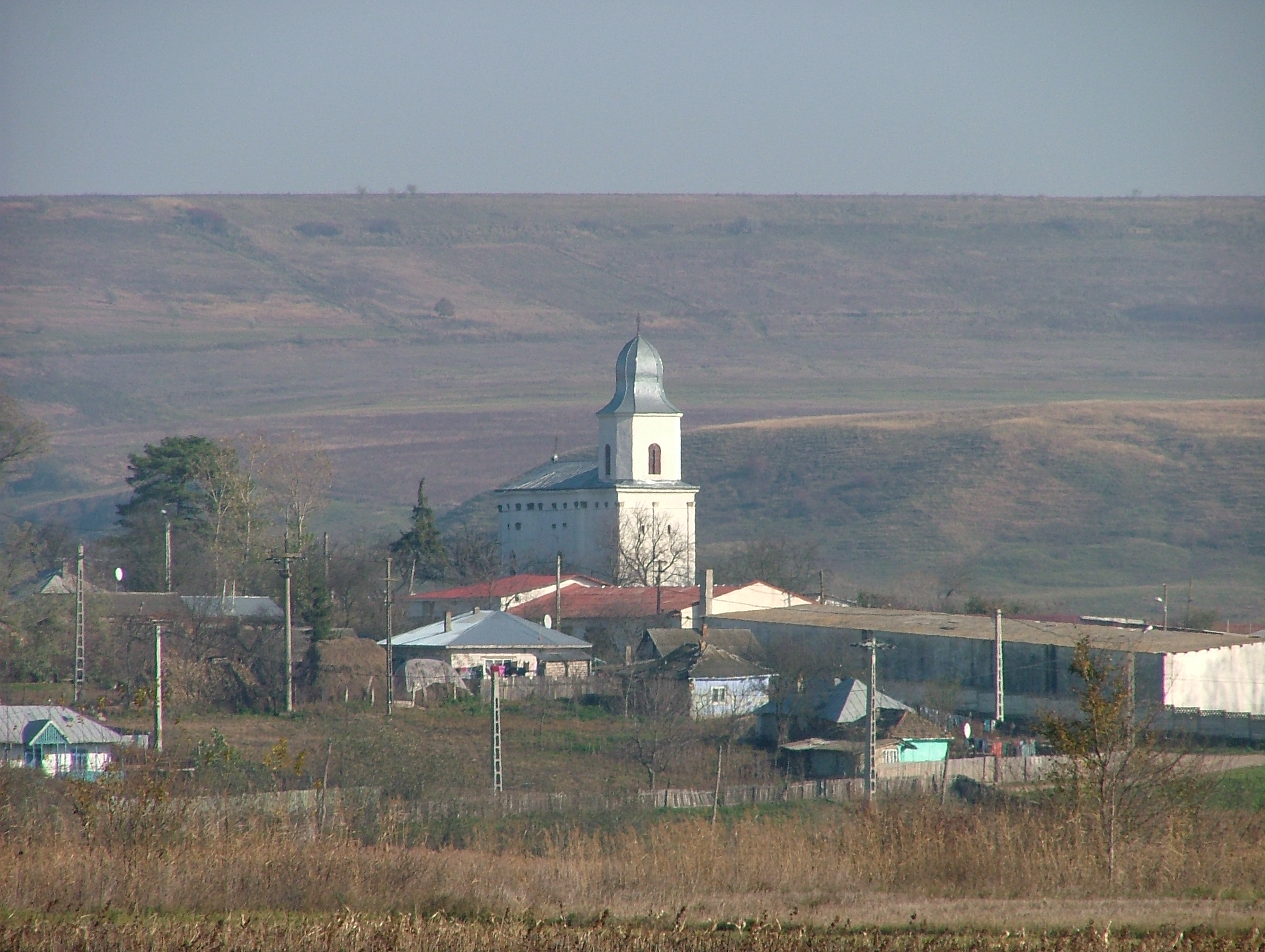 Biserica "Sf. Împărați"